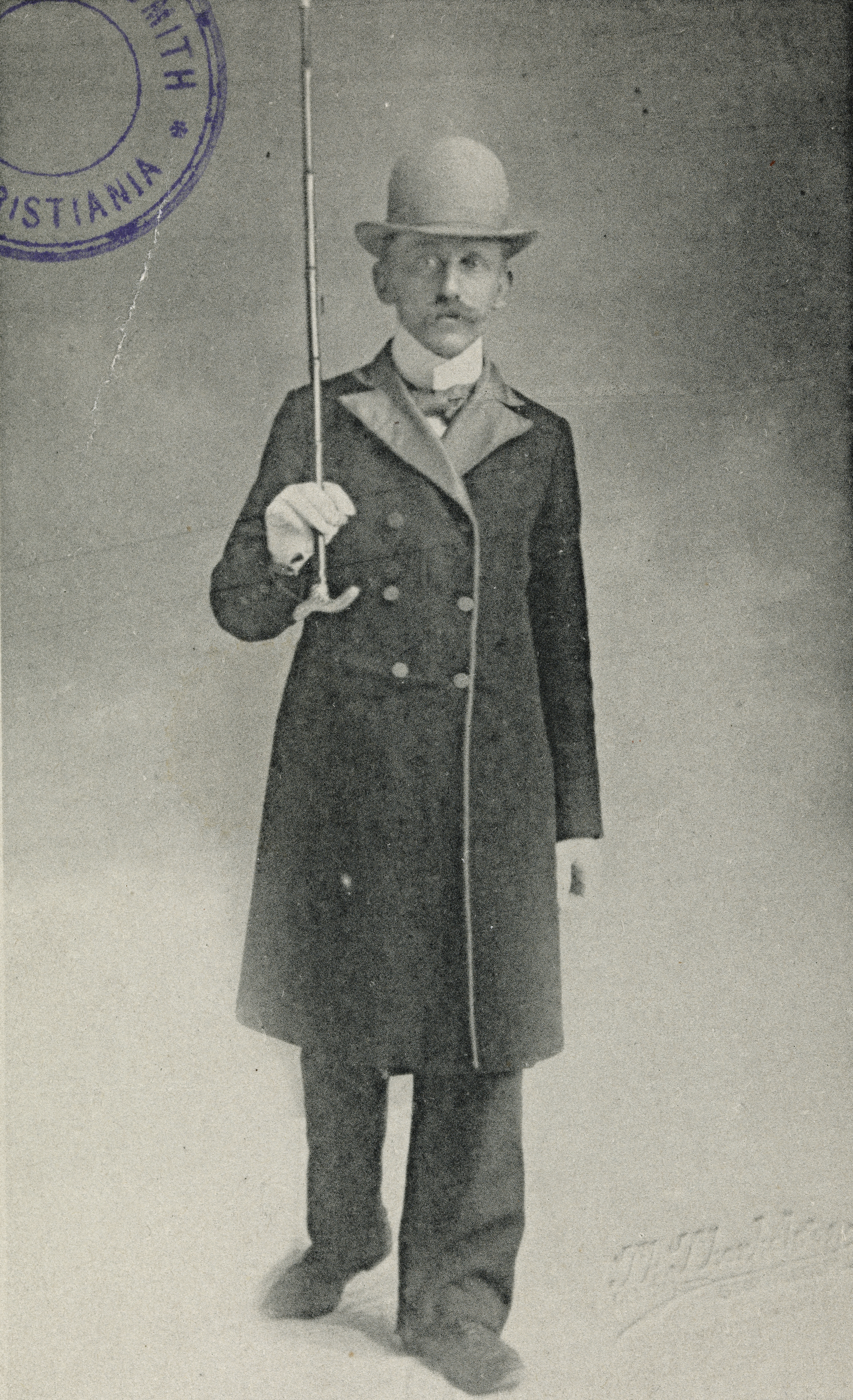 Beskrivelse / Description: Albert Martinius Møller, med kallenavnet «Snipp-Møller» var en norsk xylograf, byoriginal og musiker. Se også artikkel i Wikipedia Dato / Date: ca. 1901 Fotograf / Photographer: Thorkel J. Thorkelsen (1867-1945) Utgiver / Publisher: Axel Gude-Smith (Christiania) Digital kopi av original / Digital copy of original: sv/hv postkort, trykt Eier / Owner Institution: Nasjonalbiblioteket / National Library of Norway Lenke / Link: Bildesignatur / Image Number: blds_09162